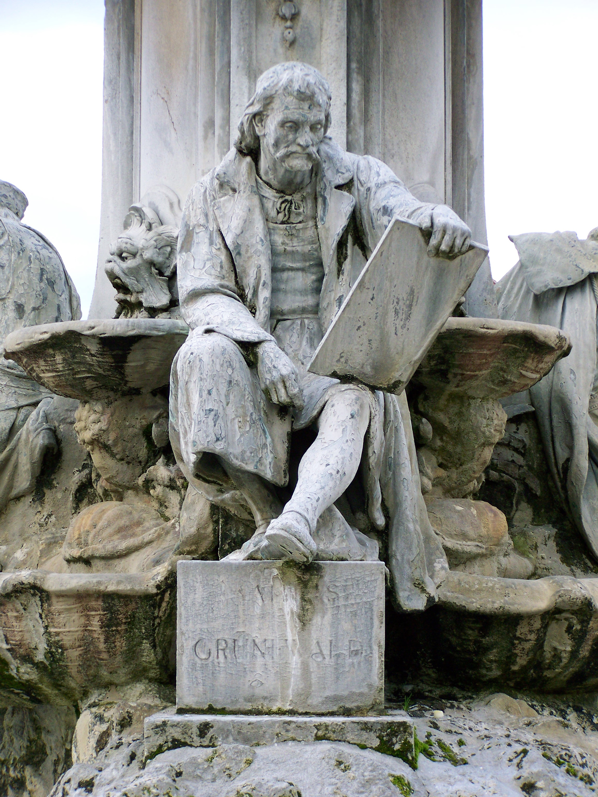 Statue von Matthias Grünewald am Frankoniabrunnen vor der Würzburger Residenz